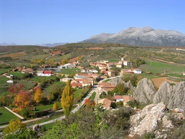 Vista general del pueblo de Colmenares, con las primeras montañas de la Cordillera Cantábrica al fondo.